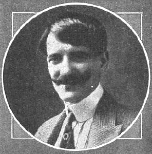 Fotografía del compositor español Manuel Penella Moreno publicada en 1913 con motivo de su regreso de una campaña realizada en el Teatro de la Comedia de Buenos Aires